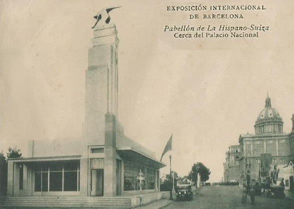 Pabellón de la Hispano-Suiza.